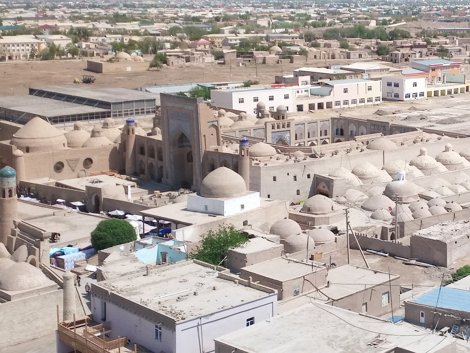 mittig Medrese Alla Kuli Khan, unterhalb Ak-Moschee, links Tim